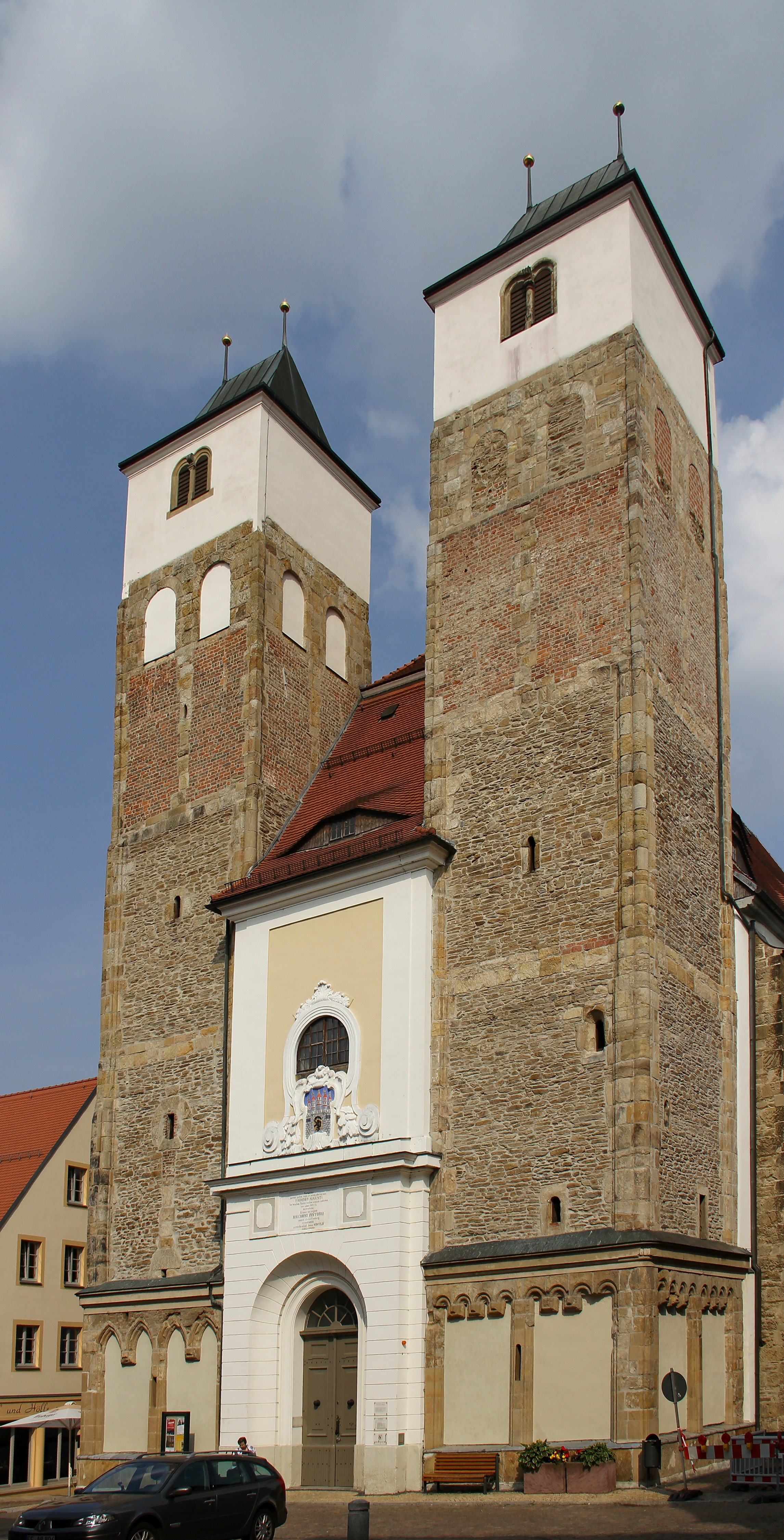 Kulturdenkmal in Freiberg; Denkmalsnummer und Adresse laut Dateiname